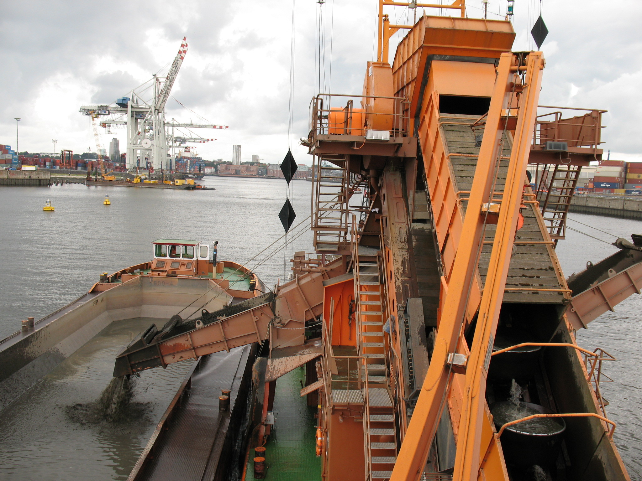 Eimerkettenbagger Heimdall (Schlickbaggerung im Hambugrer Hafen)